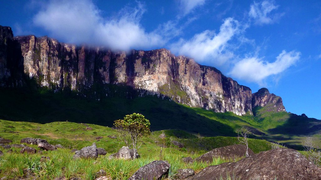 Mount Roraima, Venezuela